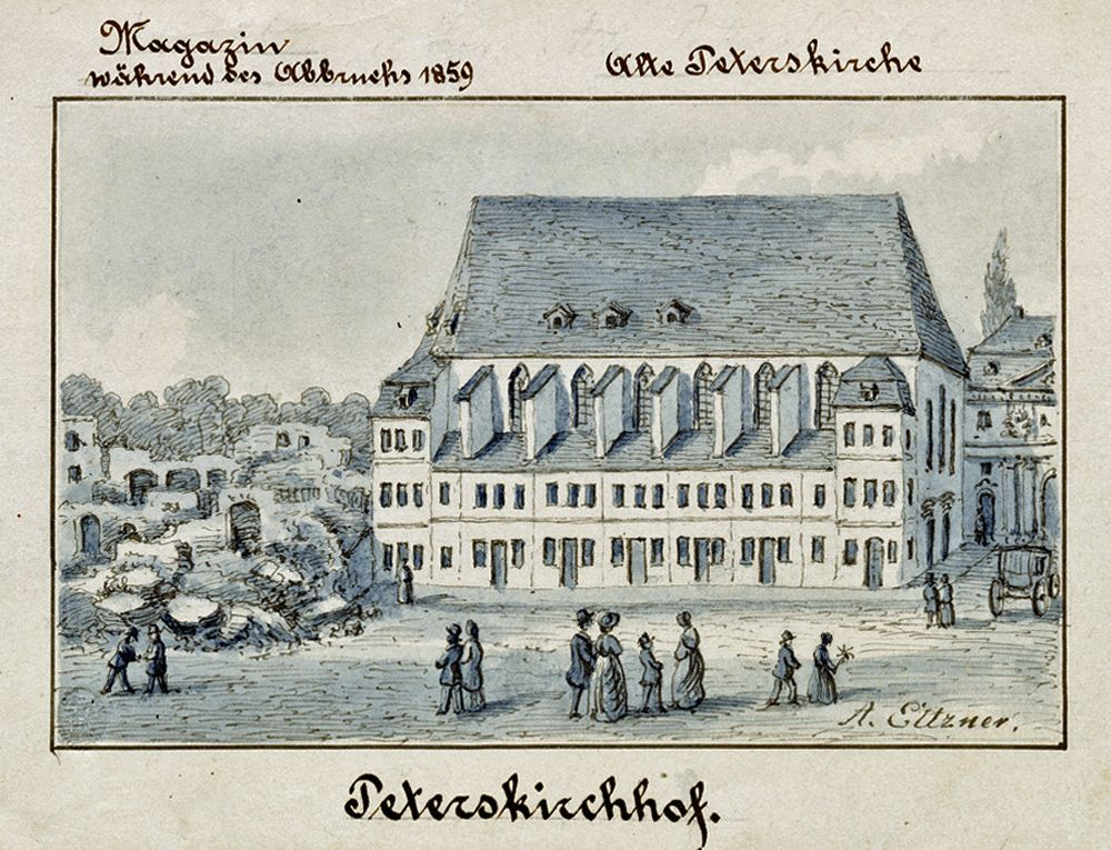 Der Abbruch des Kornhauses (Magazin) in Leipzig 1859 (links), rechts die alte Peterskirche und das Peterstor